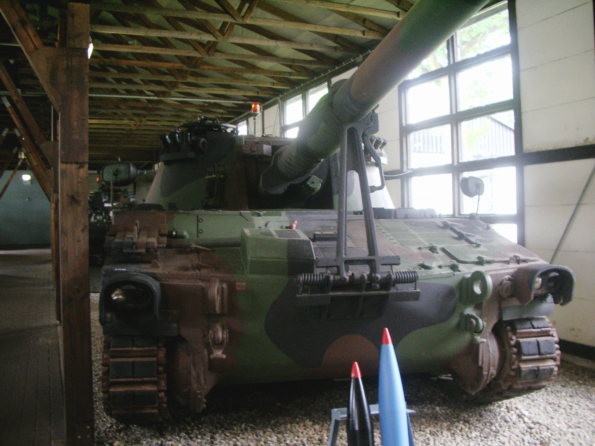 Panzerhaubitze M 109 A3 GE A1 Besatzung: 8 Soldaten Gewicht: 25,5 Tonnen Motorleistung: 262 kW (356 PS) Bewaffnung: 1 155 mm Panzerhaubitze L/38 und 1 Fla-MG 7,62 mm Baujahr: in den 80er Jahre Stückzahl: 586